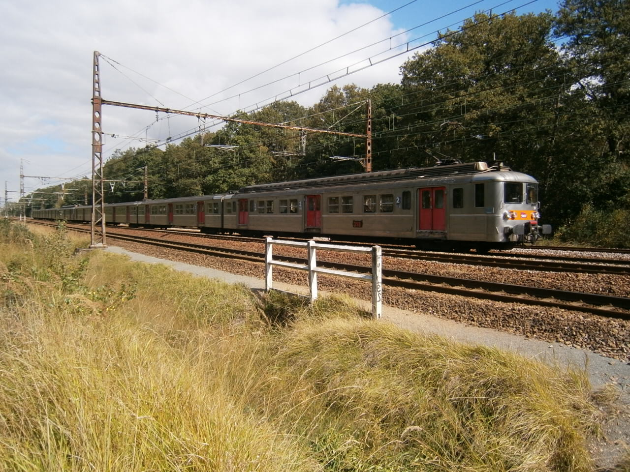 Une UM de Z 5300 roule sur la ligne de Paris-Montparnasse à Brest, au Perray-en-Yvelines (78). Elle assure une mission Transilien N, de Paris-Montparnasse à Rambouillet.